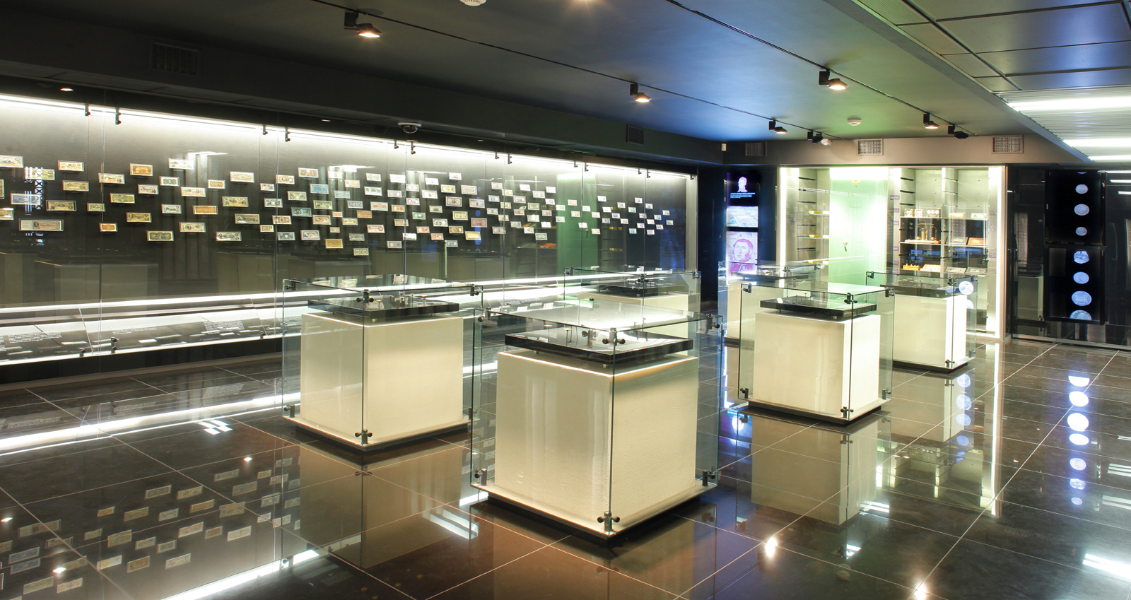 Vista general del interior del Museo